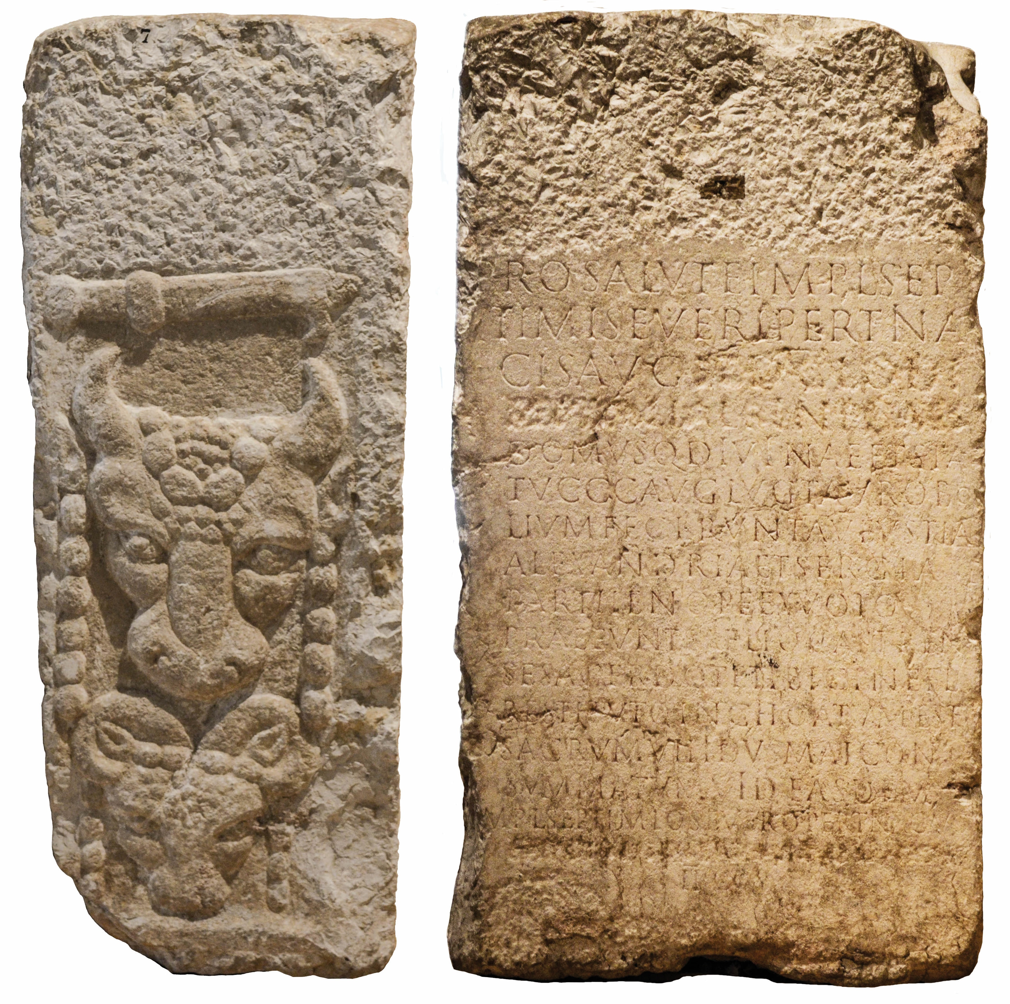 Autel taurobolique de 194, musée gallo-romain de Fourvière à Lyon (CIL XIII 1753. Face latérale gauche (harpè, tête de taureau et tête de bélier), face principale (texte).